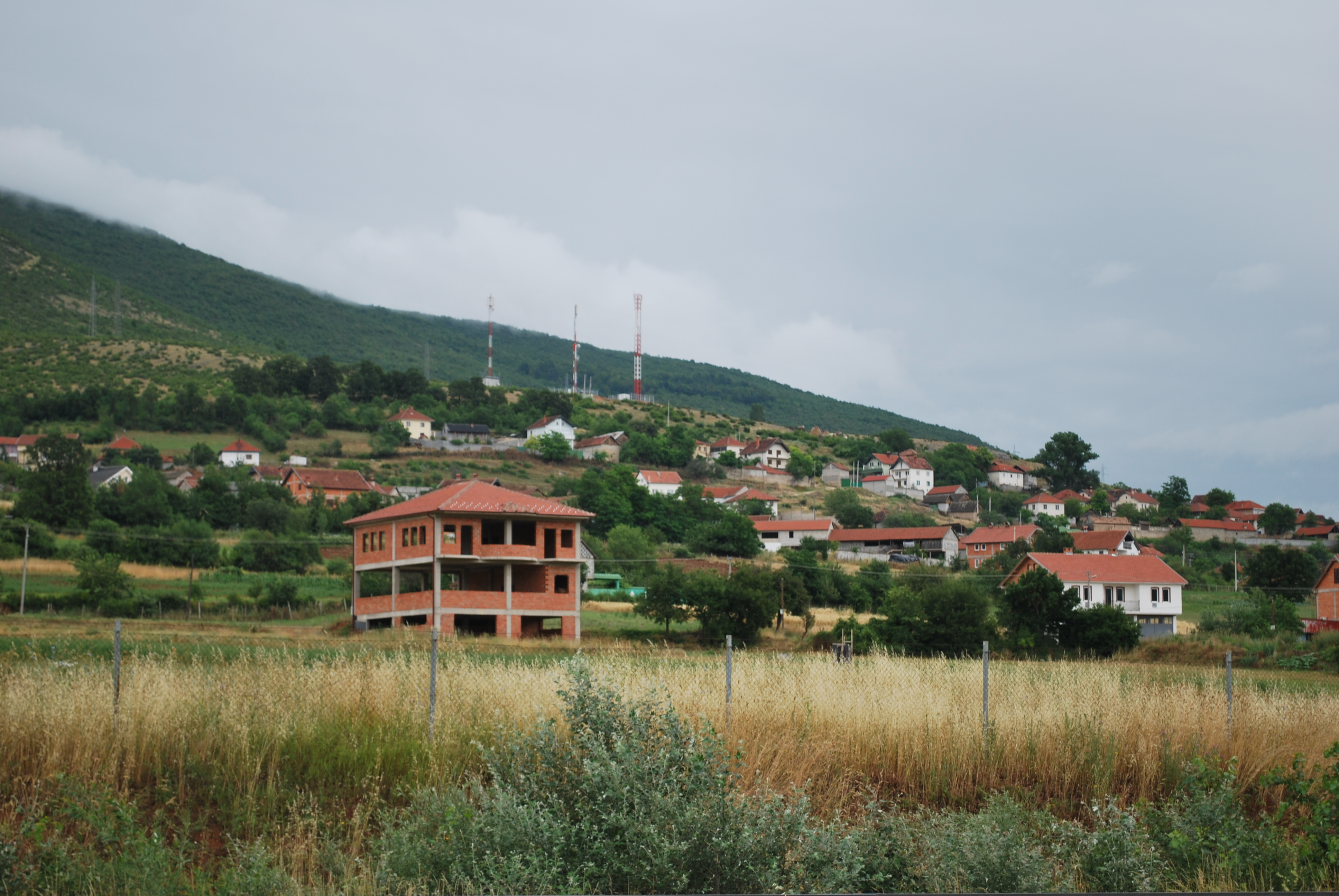 Групчин, Македонија